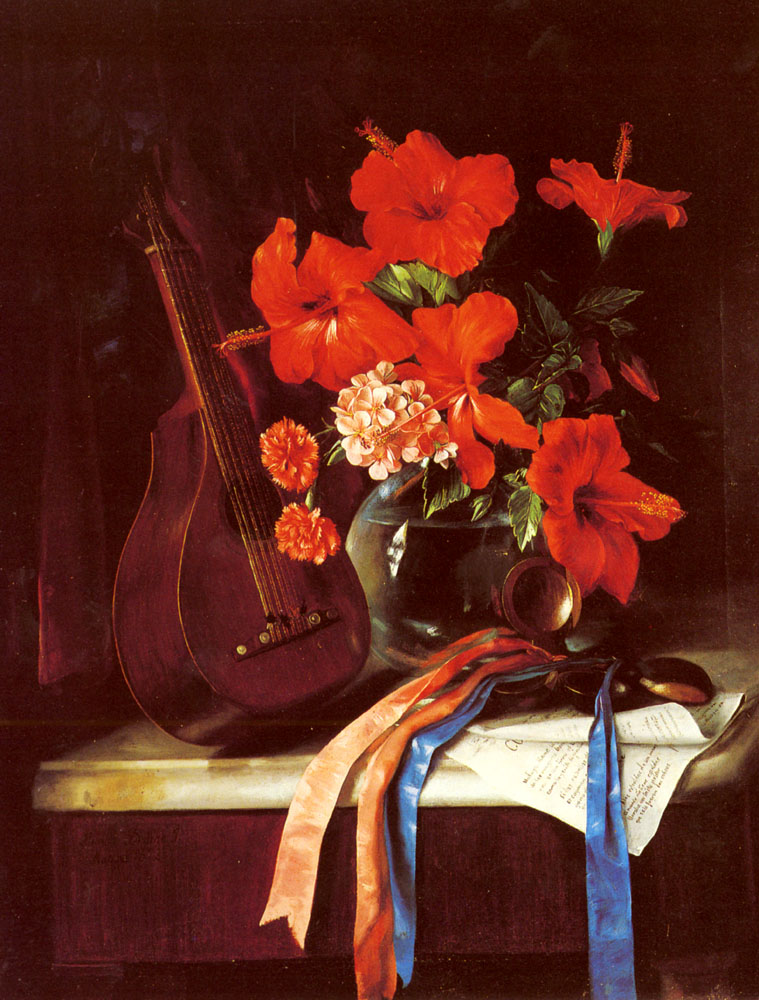 Bodegón con mandolina y castañuelas